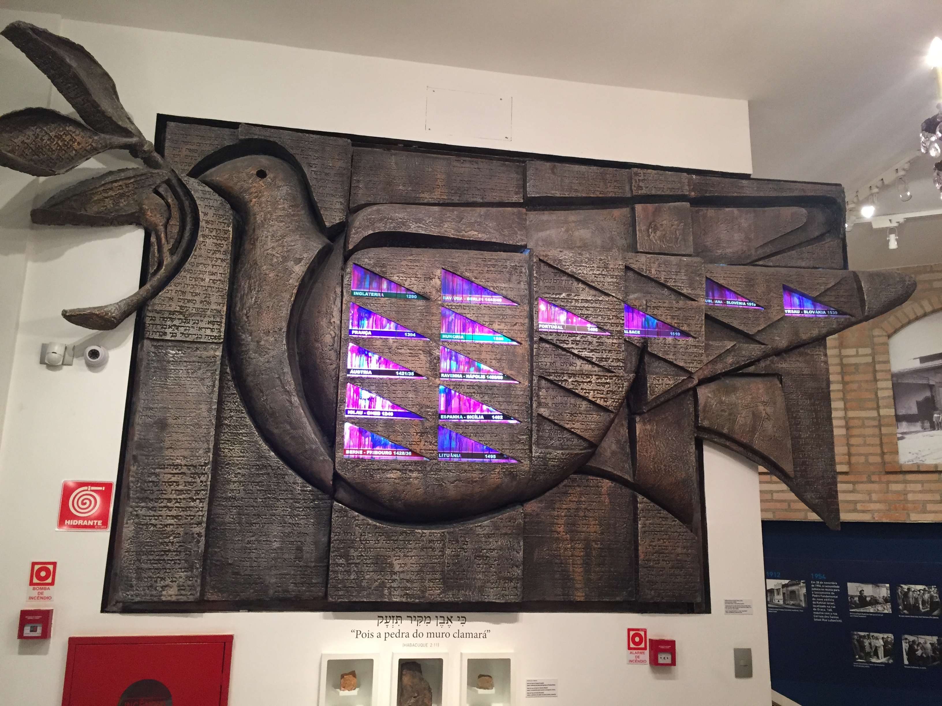 Símbolo do Memorial da Imigração Judaica